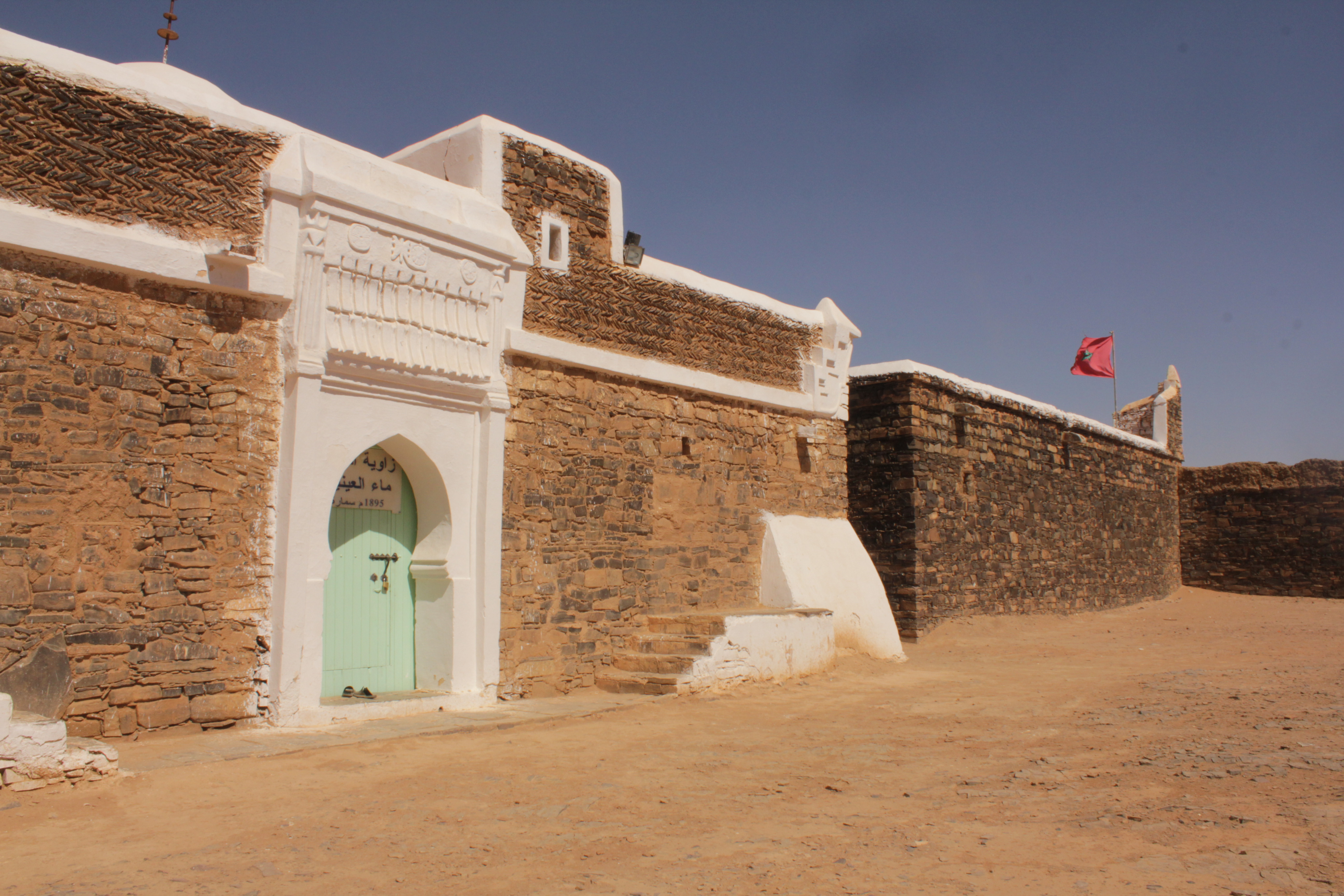 مدخل زاوية الشيخ ماء العينين و بجانبها المسجد ، السمارة ، المغرب